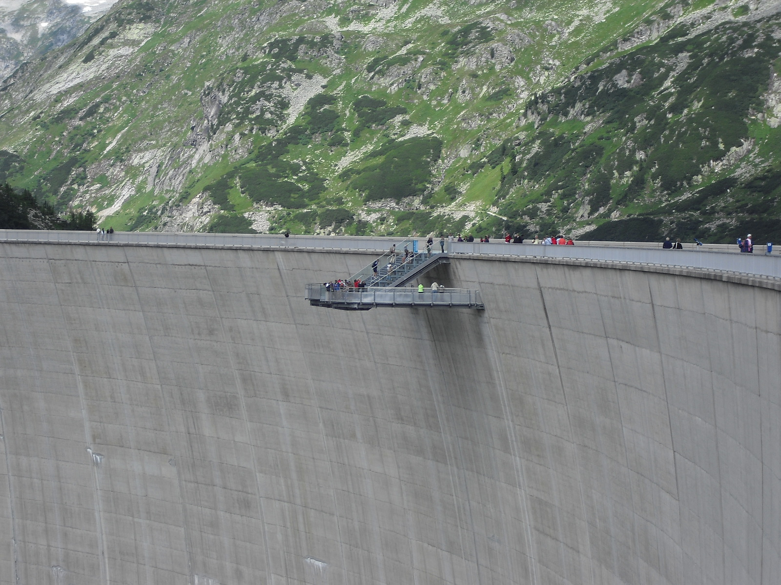 Der Skywalk an der Kölnbreinsperre